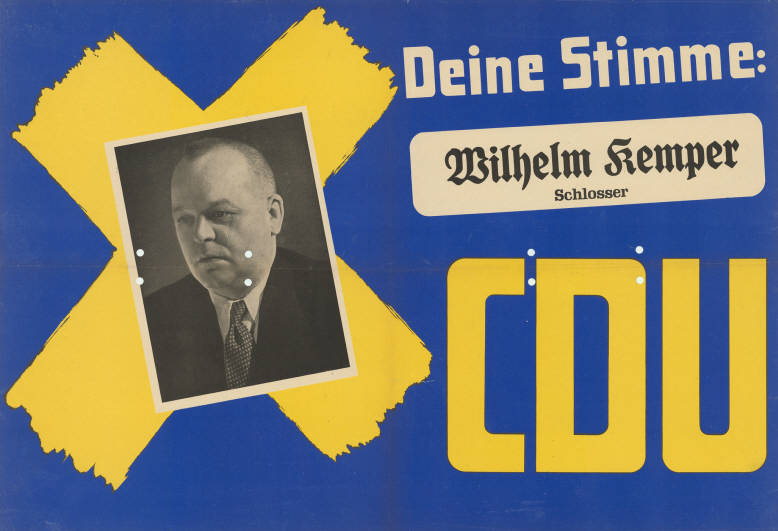 Deine Stimme: Wilhelm Kemper Schlosser CDU Abbildung: Porträtfoto - Stimmkreuz Plakatart: Kandidaten-/Personenplakat mit Porträt Objekt-Signatur: 10-009 : 205 Bestand: Landtagswahlplakate Nordrhein-Westfalen (10-009) GliederungBestand10-18: Landtagswahlplakate Nordrhein-Westfalen (10-009) » Landtagswahl am 18.6.1950 » CDU » mit Porträtfoto Lizenz: KAS/ACDP 10-009 : 205 CC-BY-SA 3.0 DE